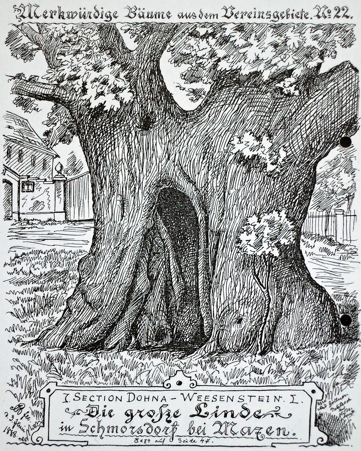 Schmorsdorfer Linde